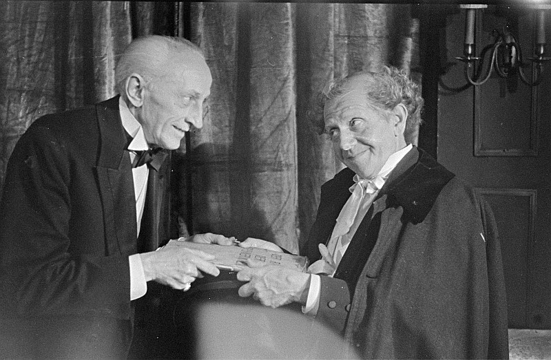 Original image description from the Deutsche Fotothek Szenenbilder Szenen aus dem Stück "Der Raub der Sabinerinnen" von Paul von Schönthan am Berliner Renaissance-Theater, Serie: Der Raub der Sabinerinnen Berlin, 1945.06 Szene mit Hans Hermann Schaufuß (links) als Theaterdirektor Emanuel Striese